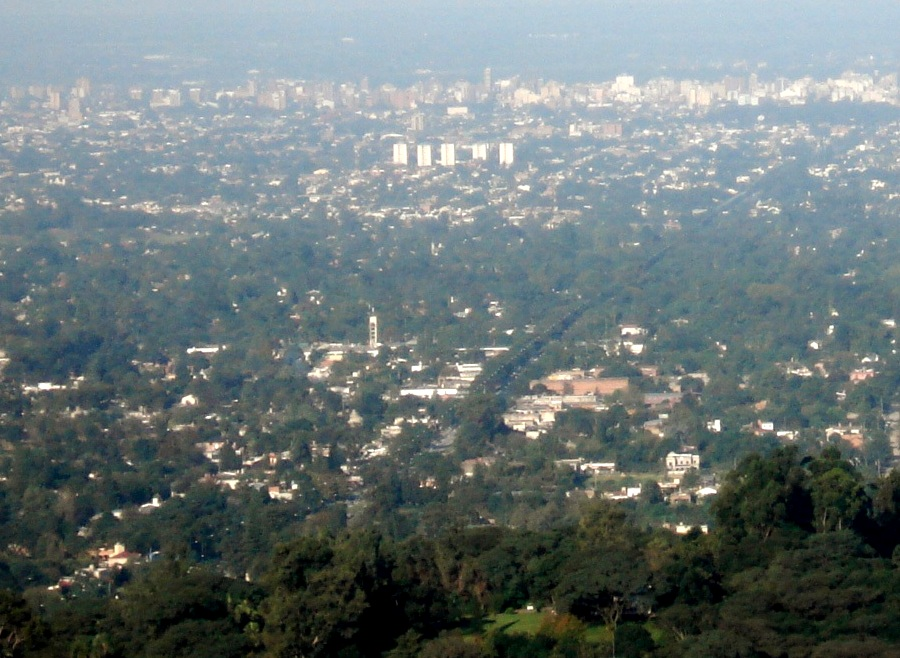 Vista de Yerba Buena. Al fondo, San Miguel de Tucumán